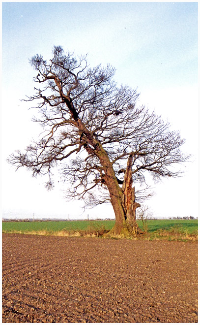 moje fotografie dubu u Dobřenic.